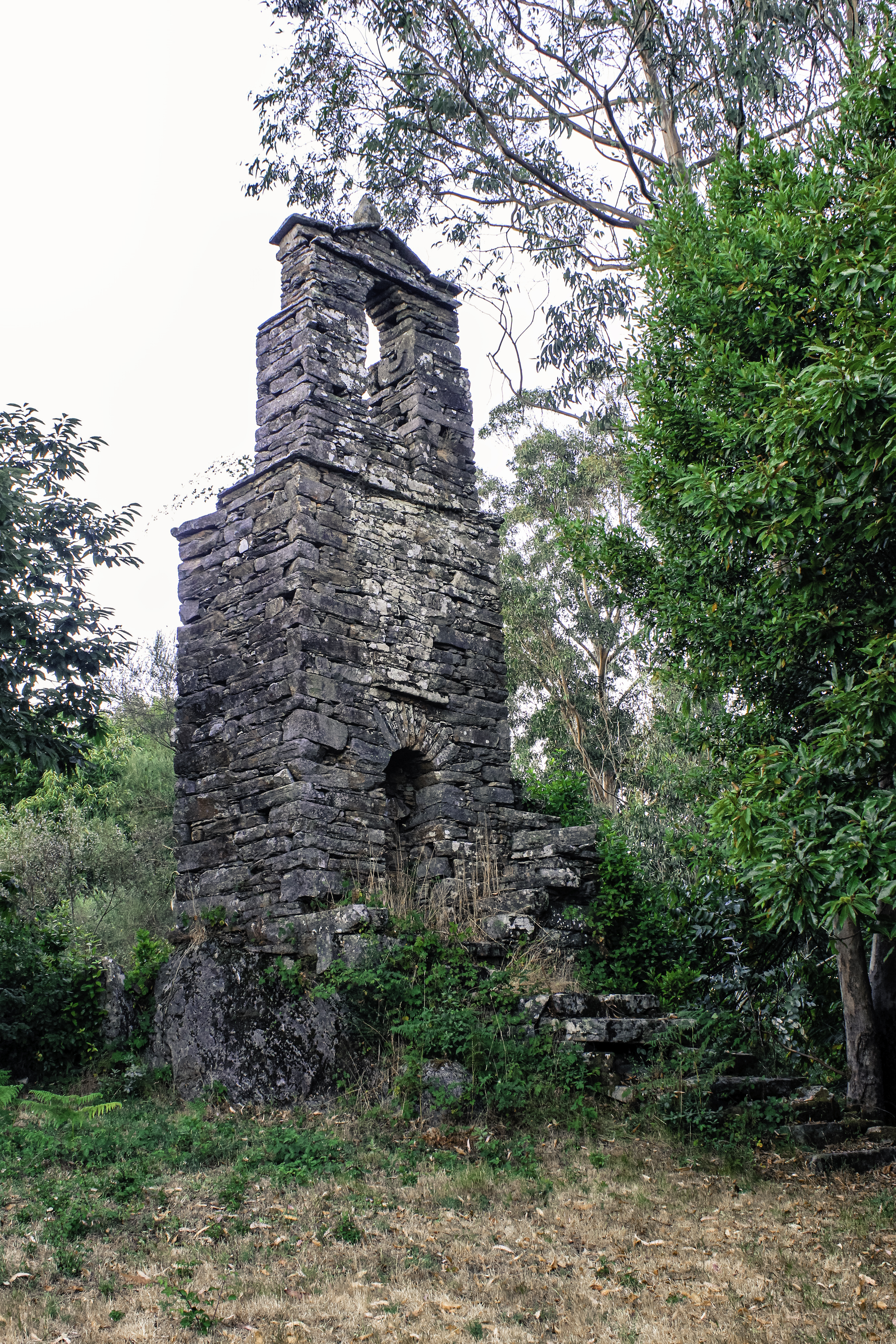 Torre de Alarma de Barciela, Forcarei.